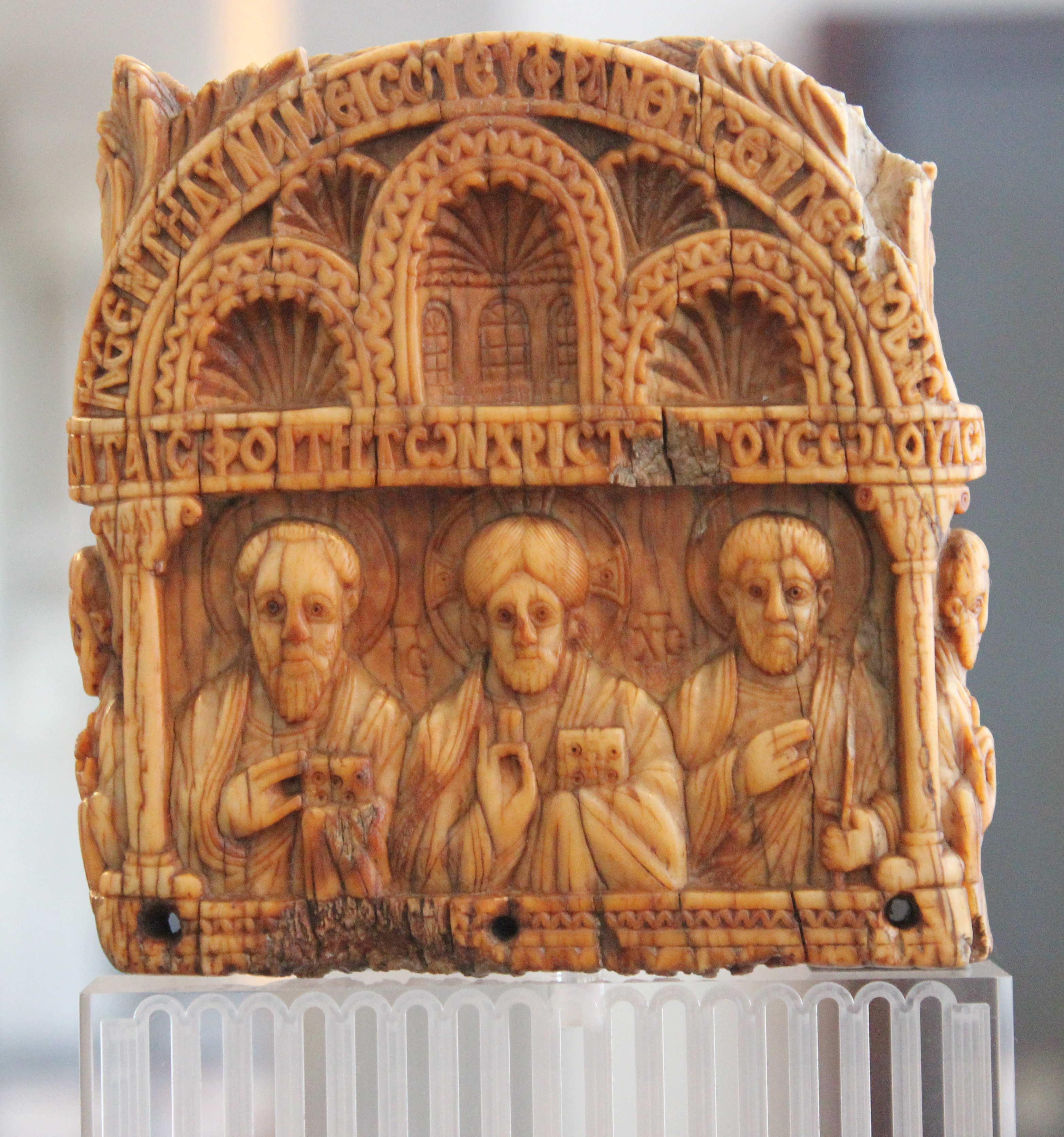 Berlín, Bode-Museum, peine de marfil del emperador León VI. Constantinopla, entre 886 y 912..